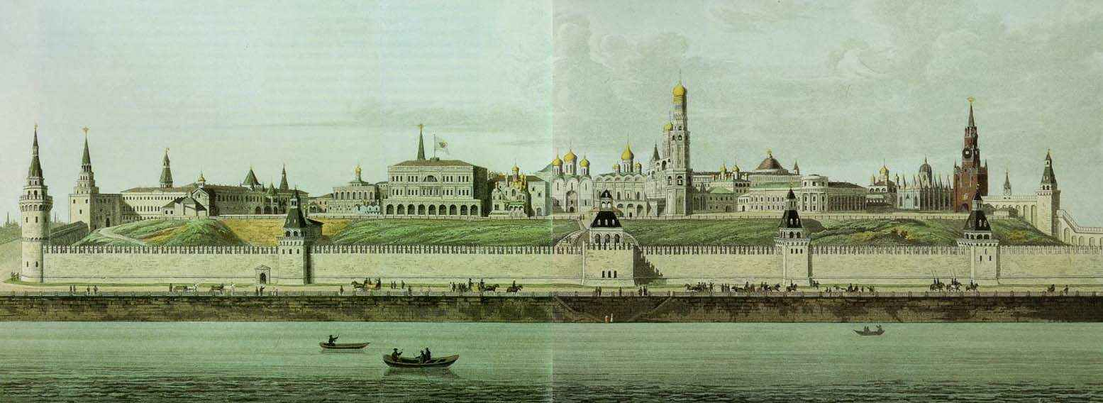 Вид Московского Кремля View of Moscow Kremlin